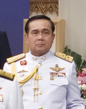 พลเอก ประยุทธ์ จันทร์โอชา ในการบันทึกเทปอาเศียรวาท 12 สิงหามหาราชินี ณ สถานีวิทยุโทรทัศน์กองทัพบกช่อง 5 วันจันทร์ ที่ 2 สิงหาคม พ.ศ.2553